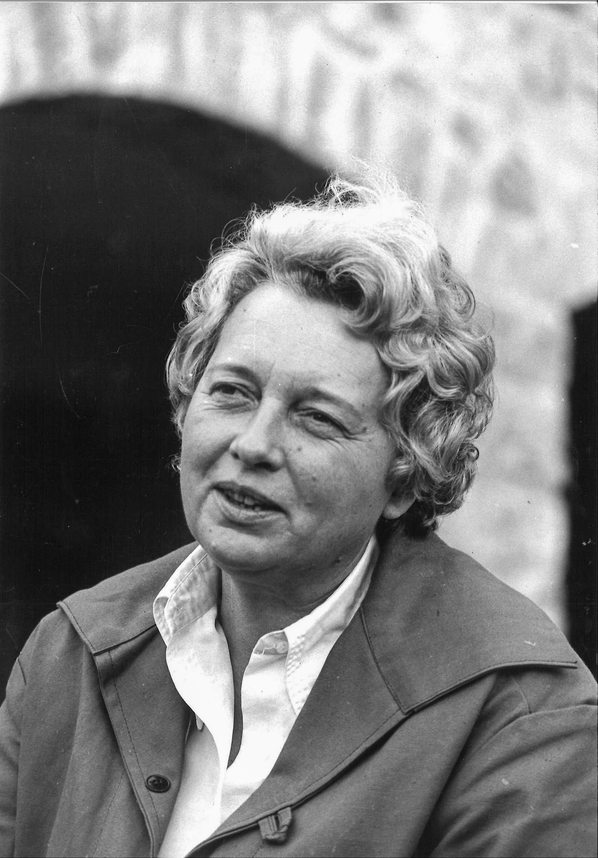 Marie-Thérèse Cheroutre en 1976 à Mélan, dans les Alpes de Haute Provence.